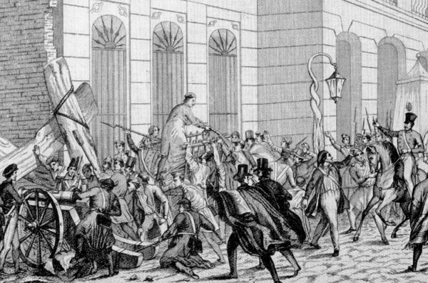 Rebomboris del pa, revuelta popular en Barcelona (1789).